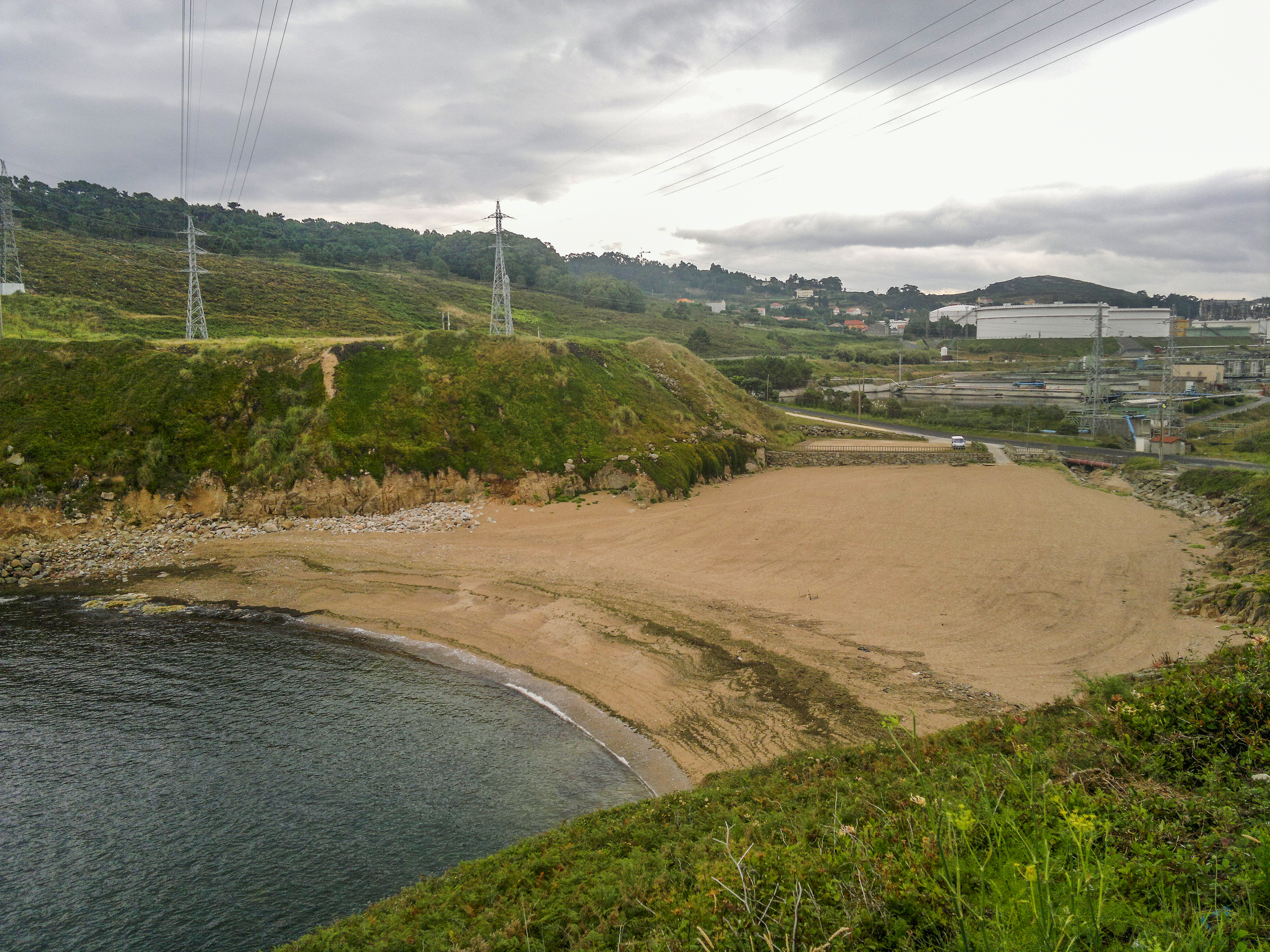 Praia de Bens, na Coruña.